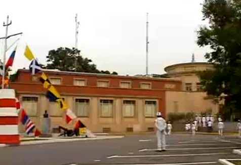 Instalaciones del Observatorio Naval Cagigal en Caracas - Venezuela